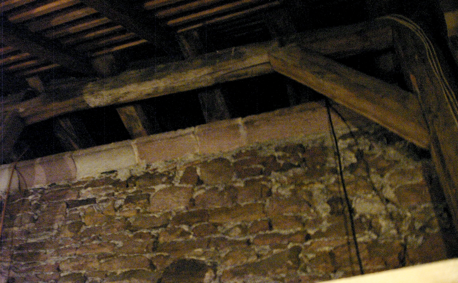 Dachgesims der Nordwand des Vorchors von Norden